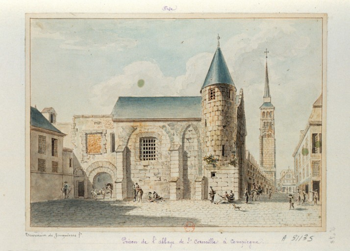 Prison de l'abbaye de Saint-Corneille à Compiègne abbaye Saint-Corneille Picardie french kings Famille Mottet